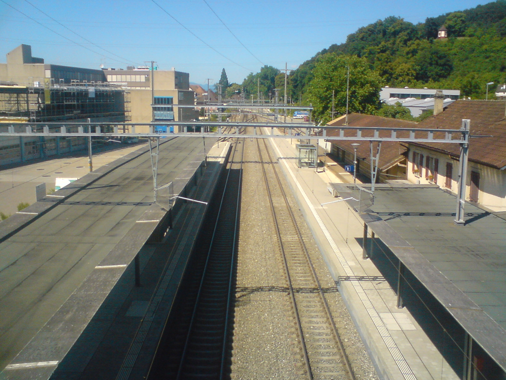 La partie nord des quais de la gare de Münchenstein.